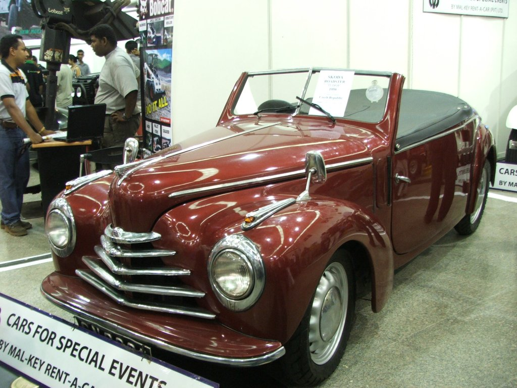 Škoda 1102 "Tudor" roadster (1950)